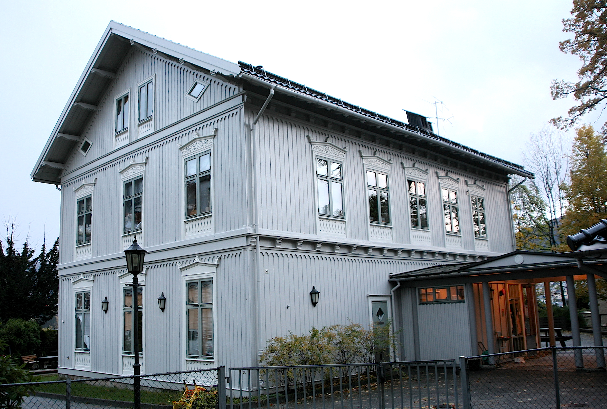 Villa Kalfaret, Bergen